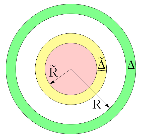 VanDenBroeckが考案したワープバブルの概形